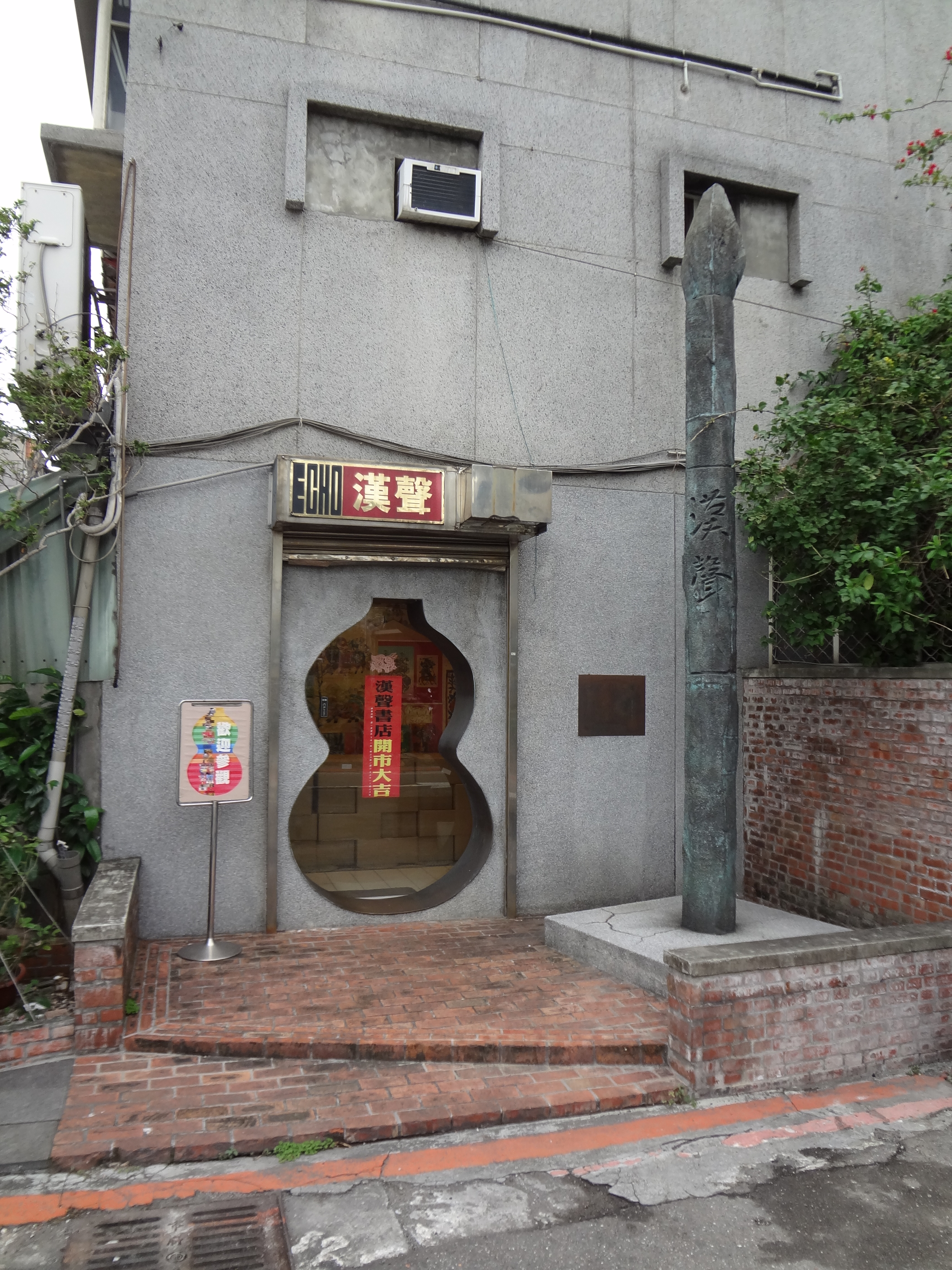 漢聲巷公司（英文漢聲出版公司的網路書店）總部，地址：臺北市松山區八德路四段72巷16弄1號1樓。此地為漢聲雜誌社社址，大門設置臺北市政府譽揚牌與朱銘雕刻作品《一柱銅筆》。